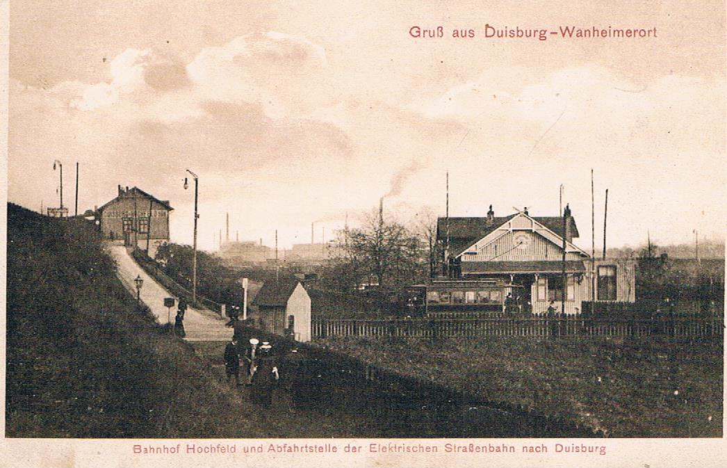 Duisburg-Wanheimerort: Bahnhof Duisburg-Hochfeld Süd und Straßenbahnhaltestelle an der Wanheimer Straße, im Hintergrund die Chamotte-Fabrik an der Düsseldorfer Straße; Aufnahme vor 1927 (wahrscheinlich vor 1915)